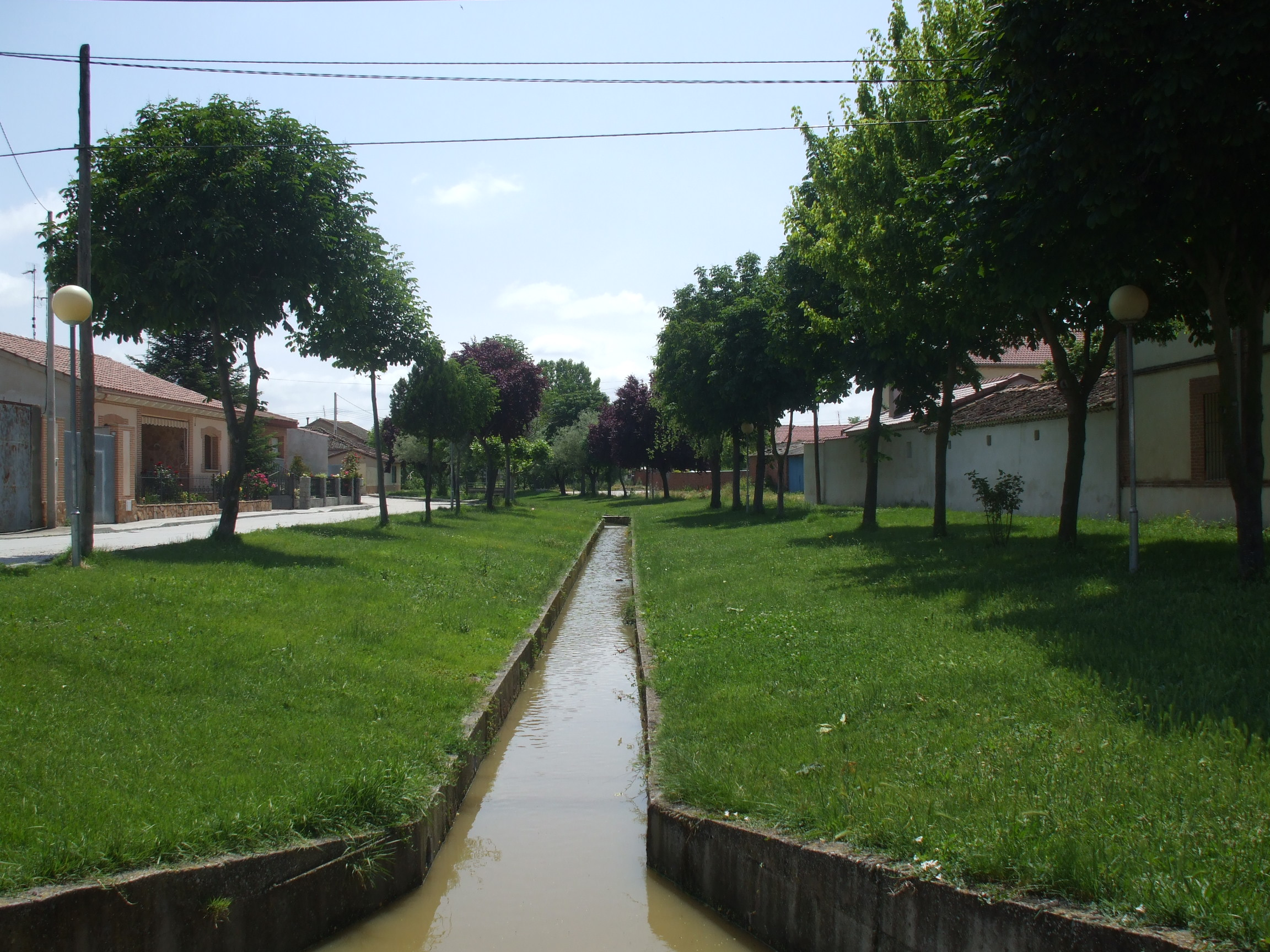 Foto de Arroyo de Cuellar